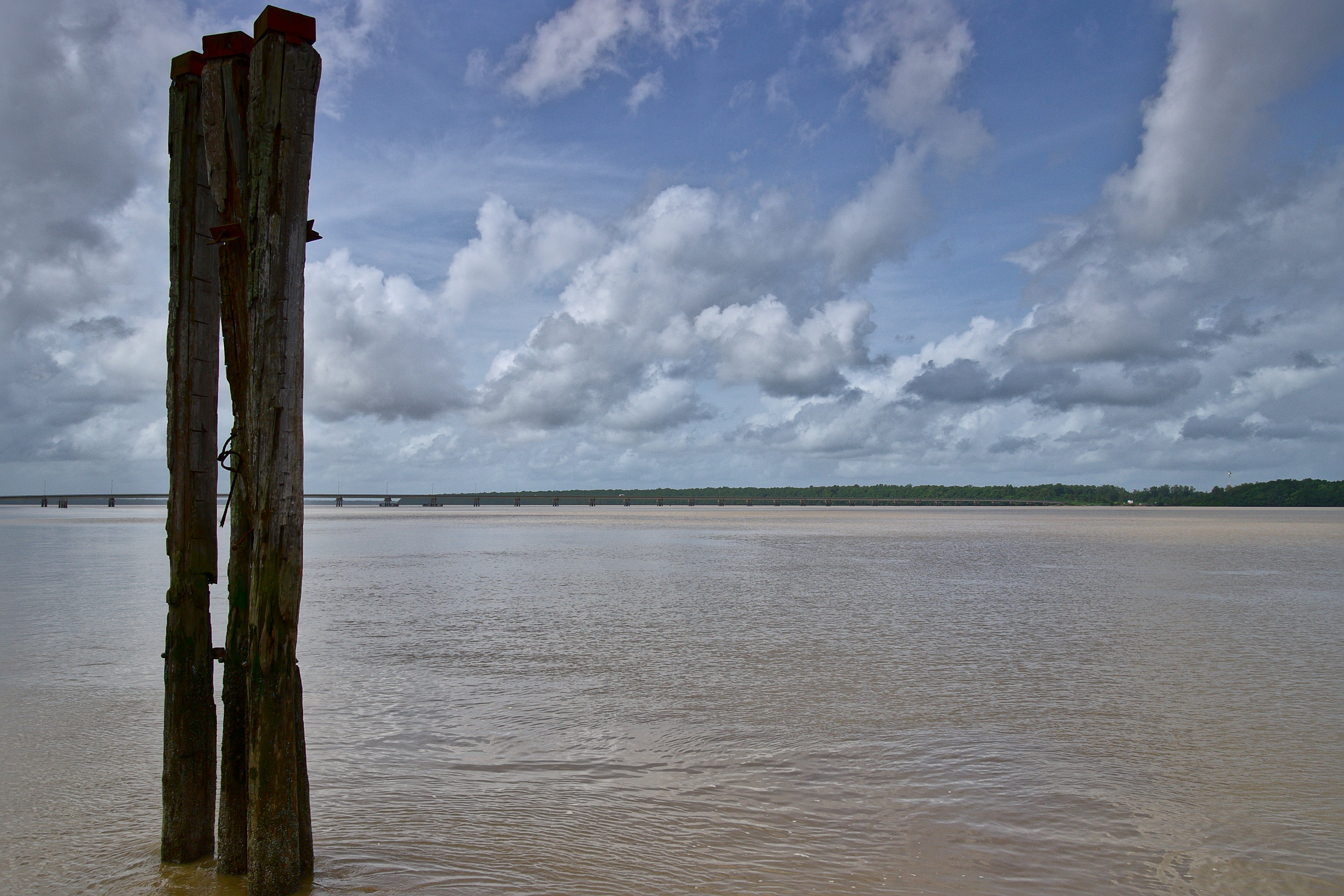 Stand